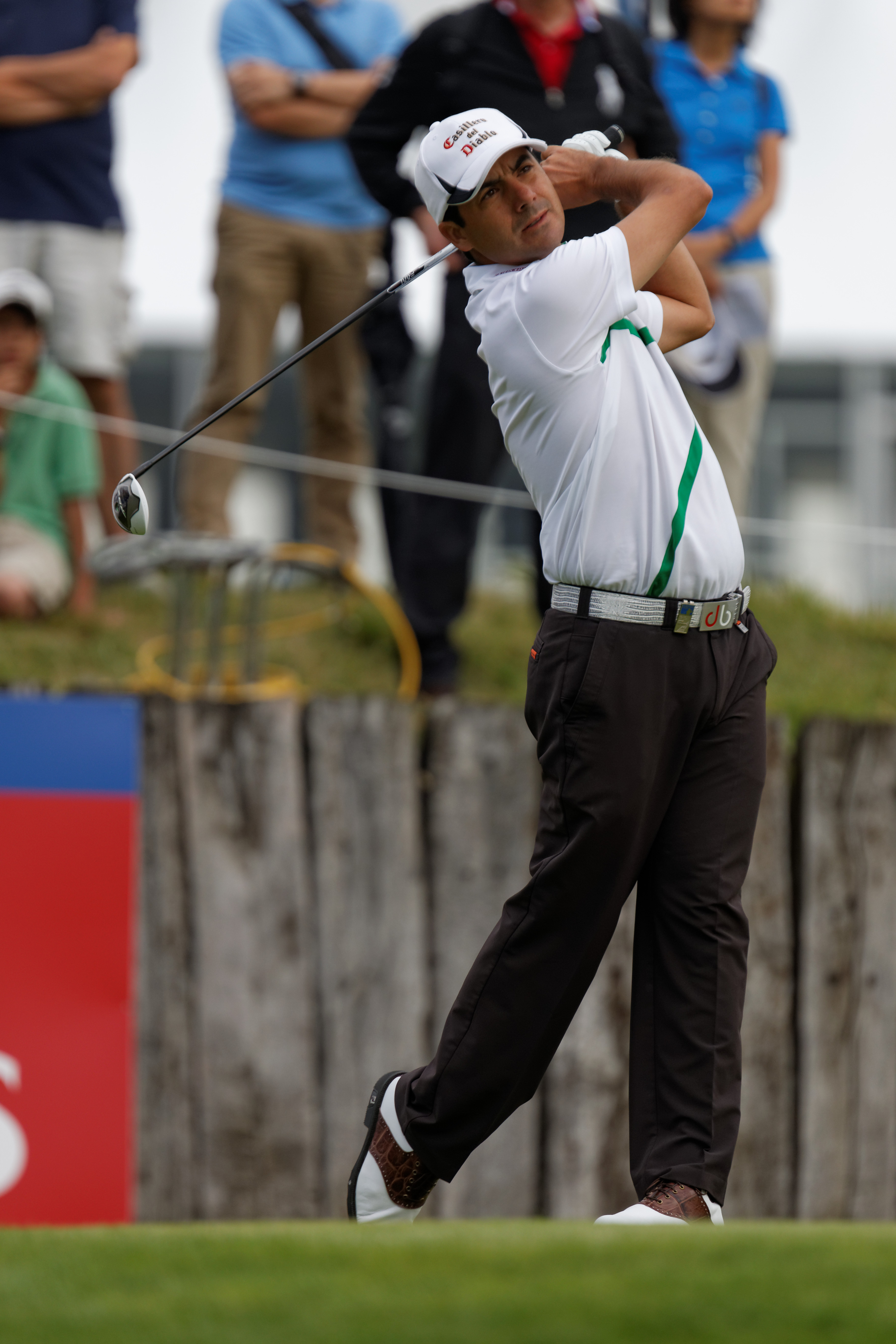 Felipe Aguilar lors du second tour de l'Open de France 2014